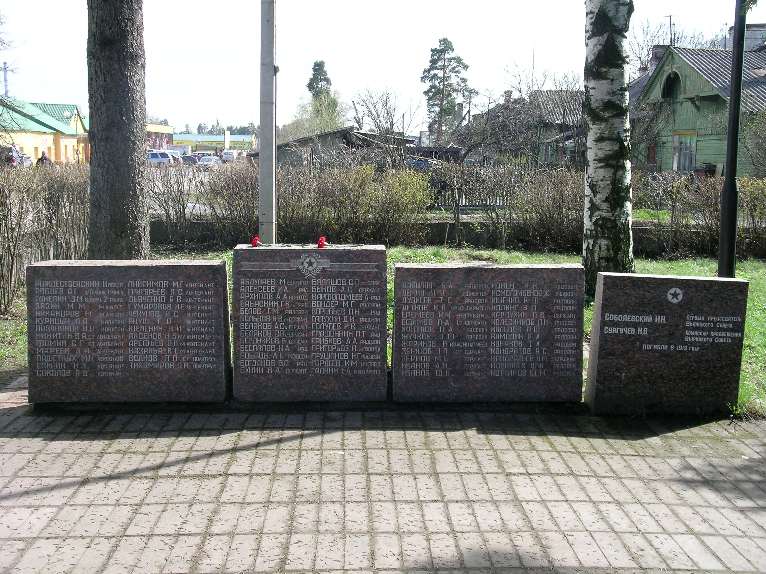 Мемориал в Вырице